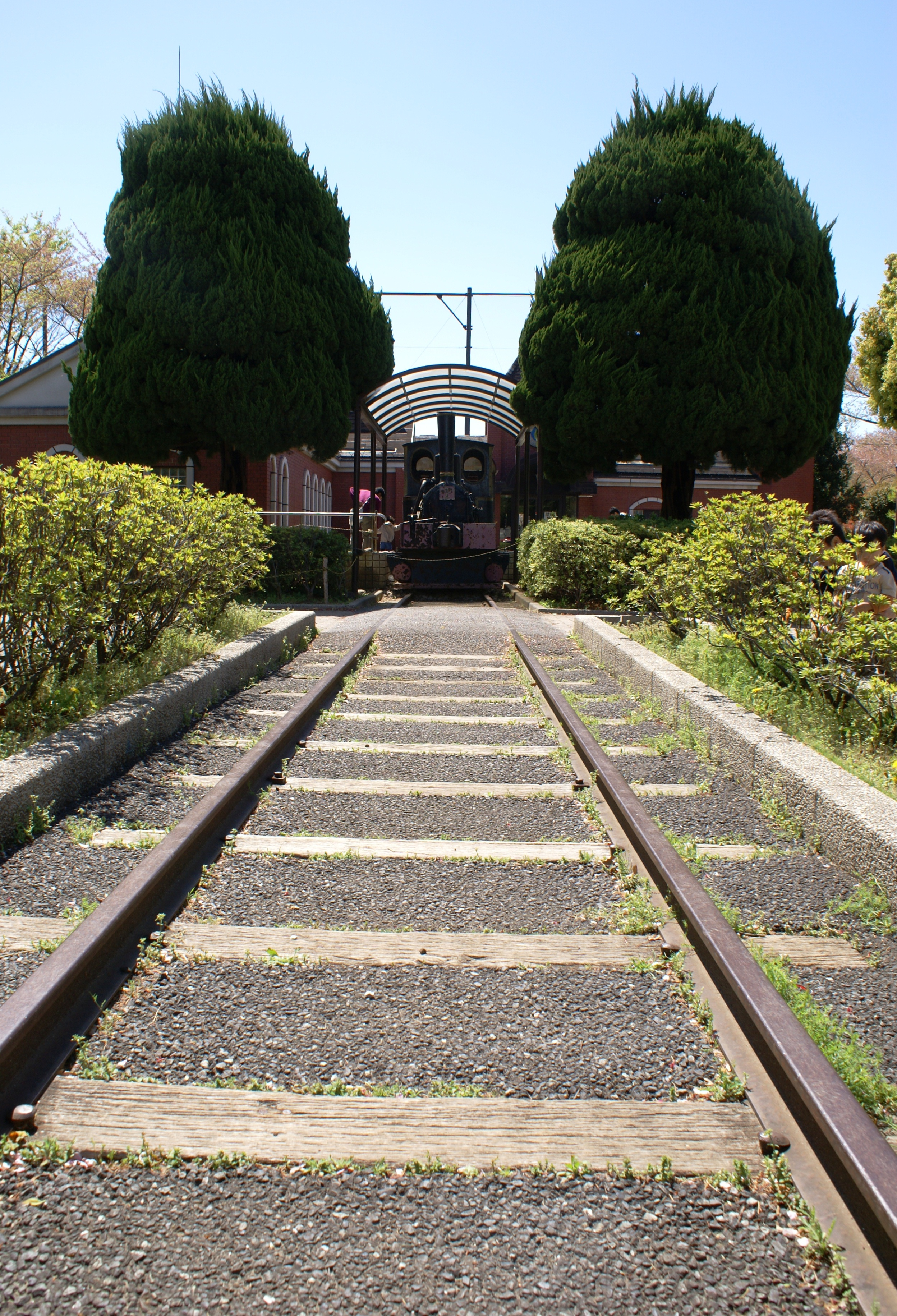 城北交通公園